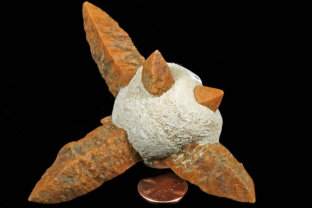 Calcit